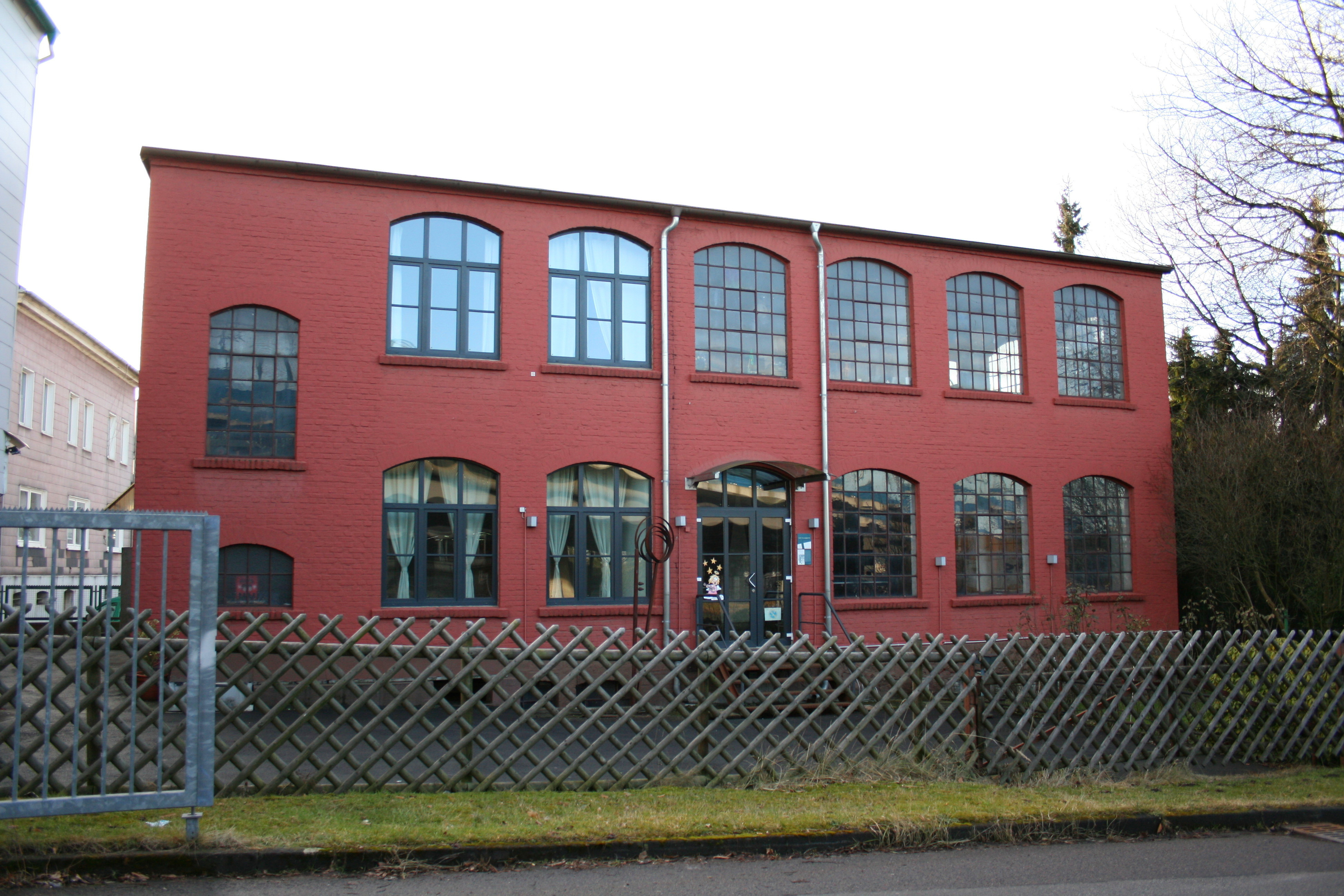 Bandfabrik Carl Kettler in Wuppertal-Langerfeld